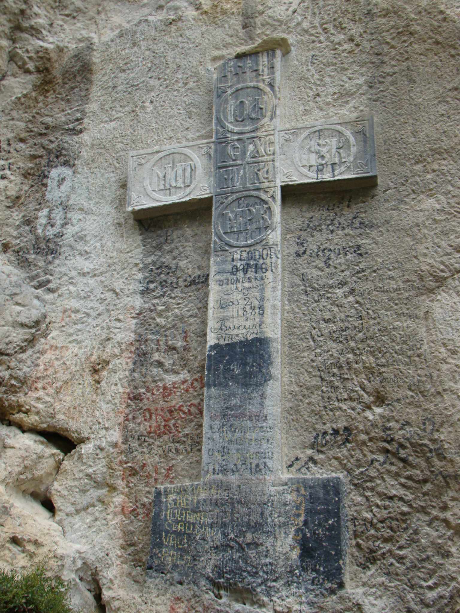 Podul Reginei Maria și cele două cruci săpate în stâncă, - sat Bistrița; comuna Costești. (la intrarea în Cheile Bistriței)